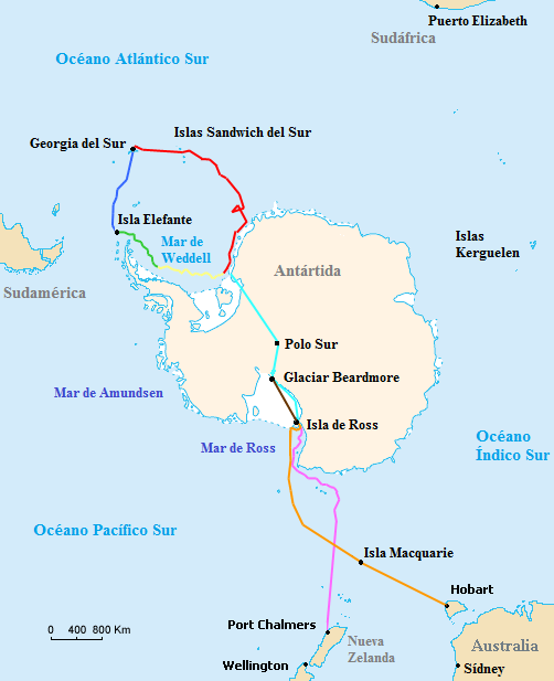 Mapa de la expedición Endurance de Shackleton, con detalle de todos los movimientos.